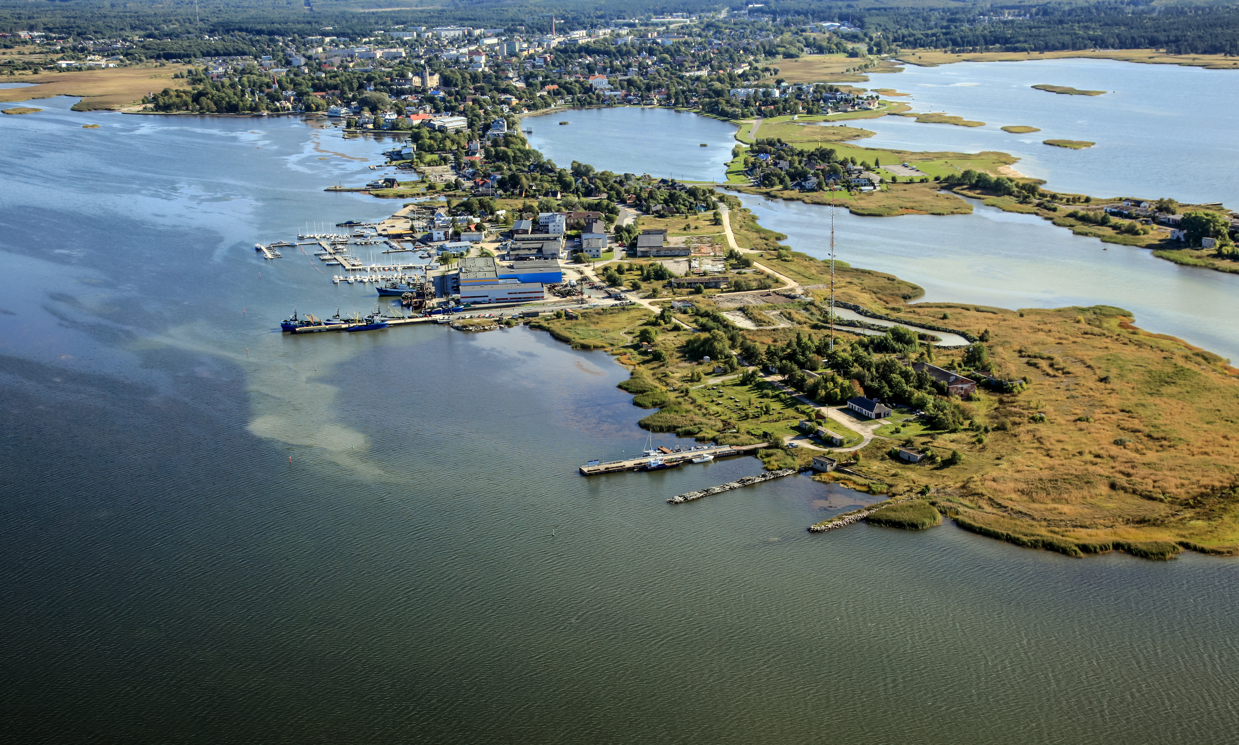 Haapsalu sadamad 2015